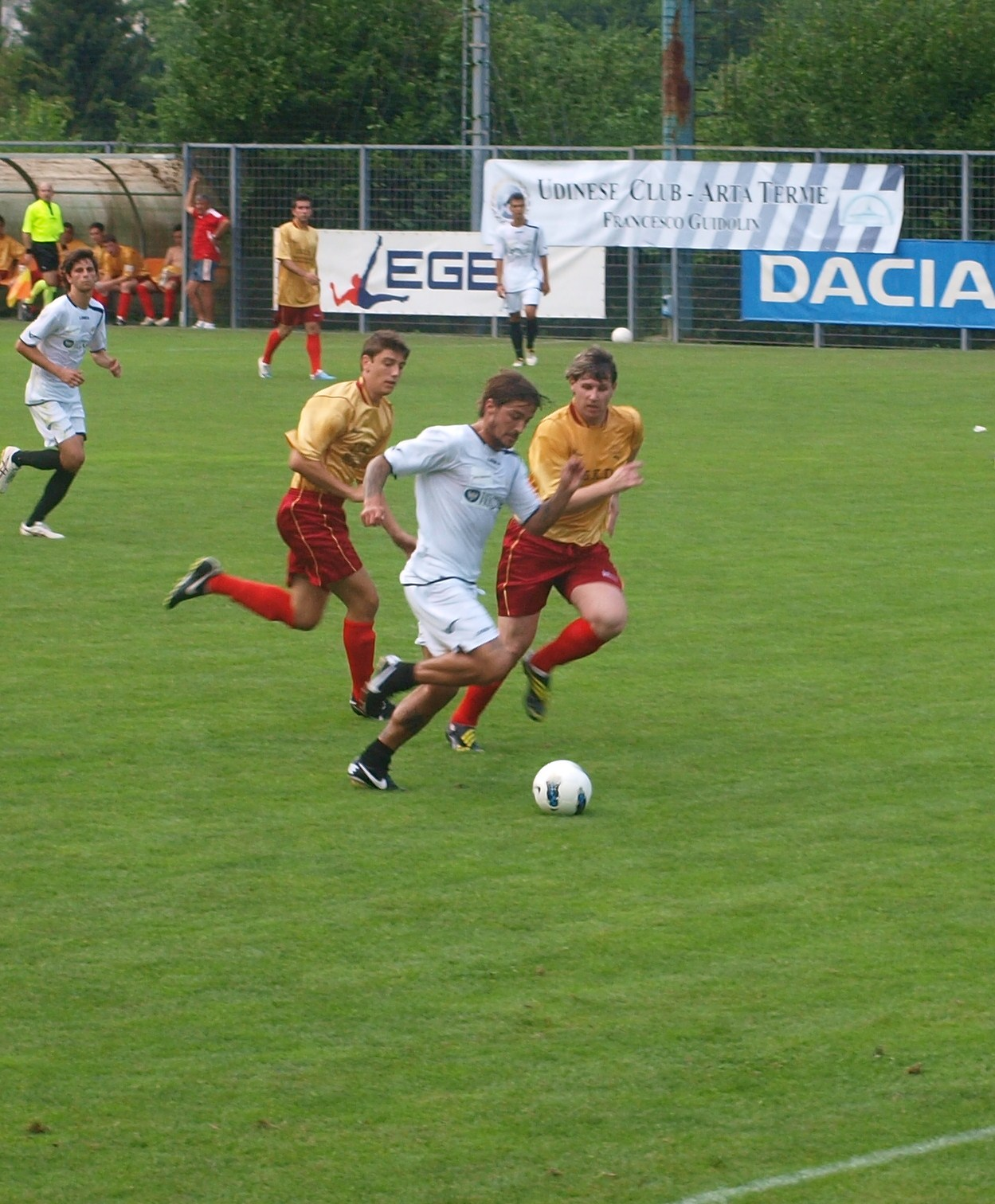 Surraco in azione con l'Udinese